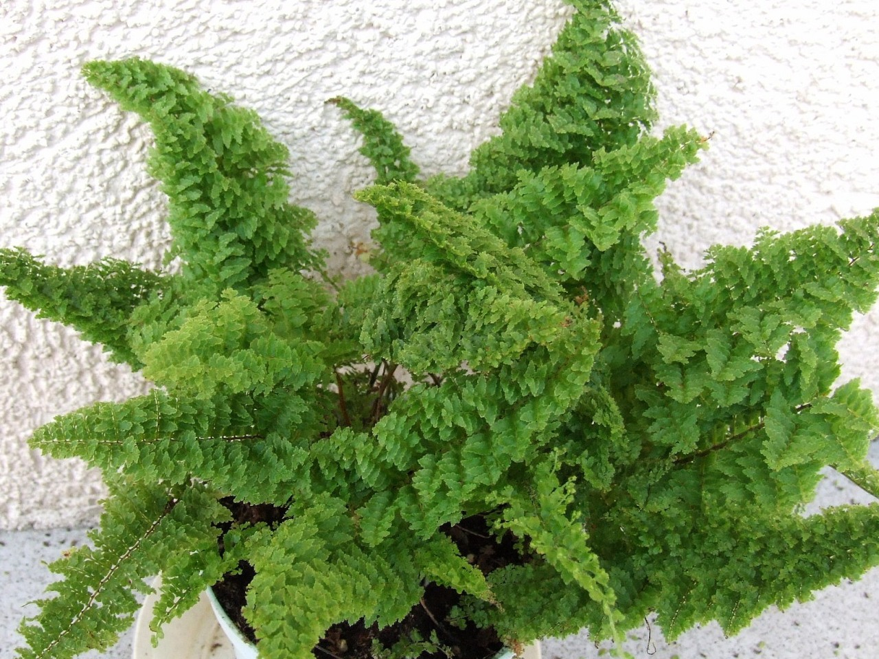 Nephrolepis exaltata 'Norvoodi'